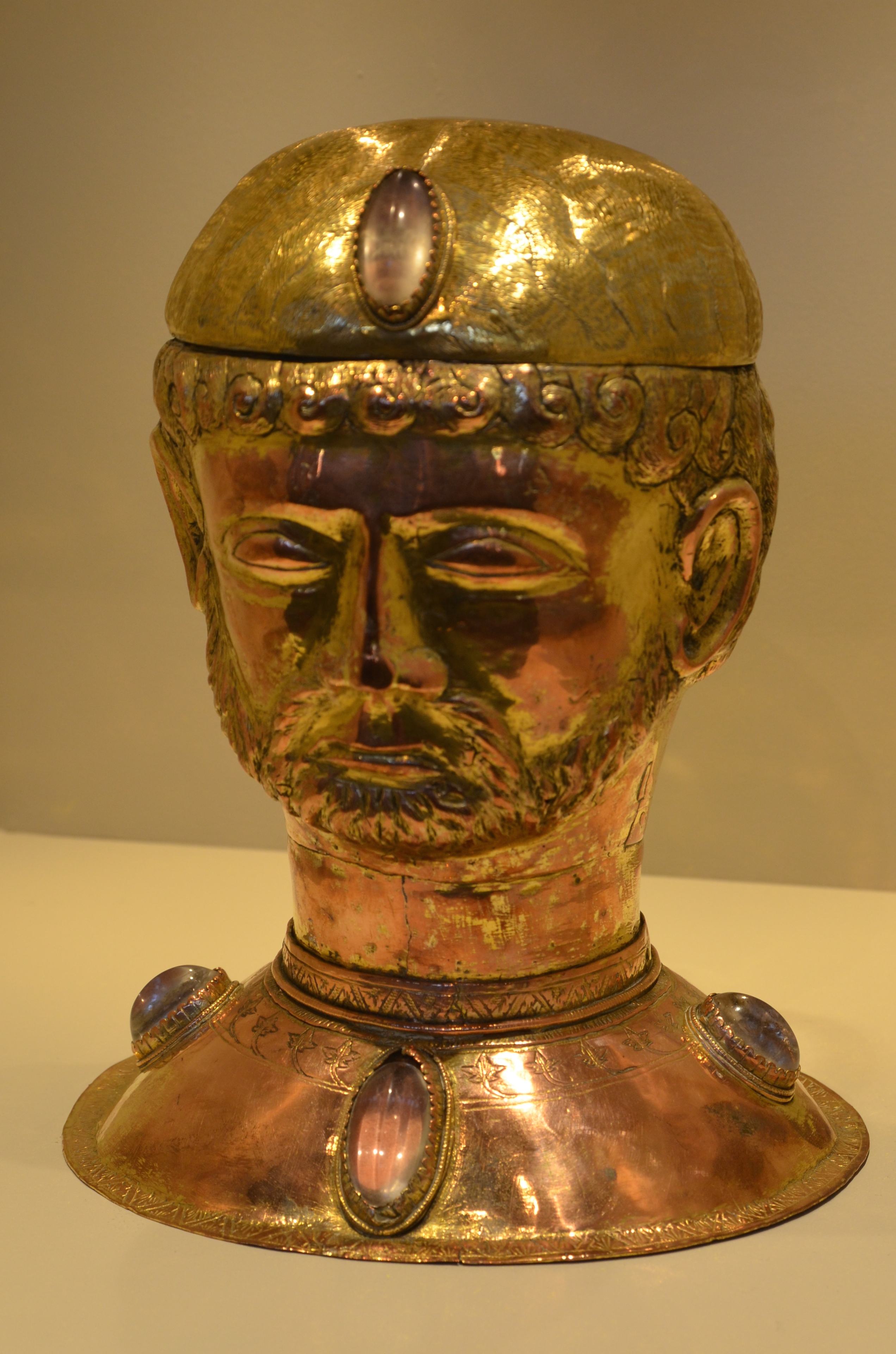 Onhaye (Belgique) - Chef-reliquaire de saint Walhère, vénéré dans l'église Saint-Martin.